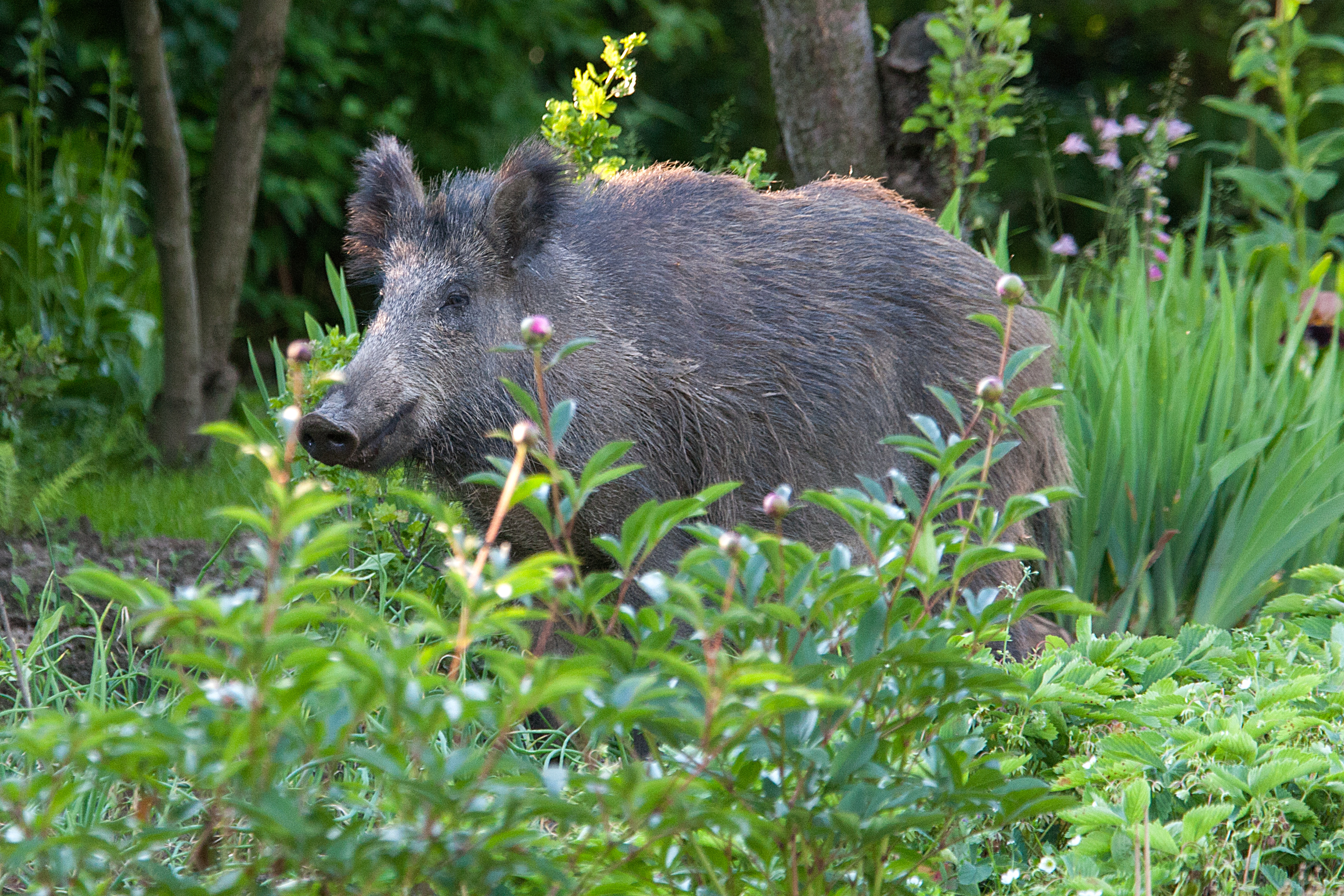 Dziki na obrzeżu Łodzi